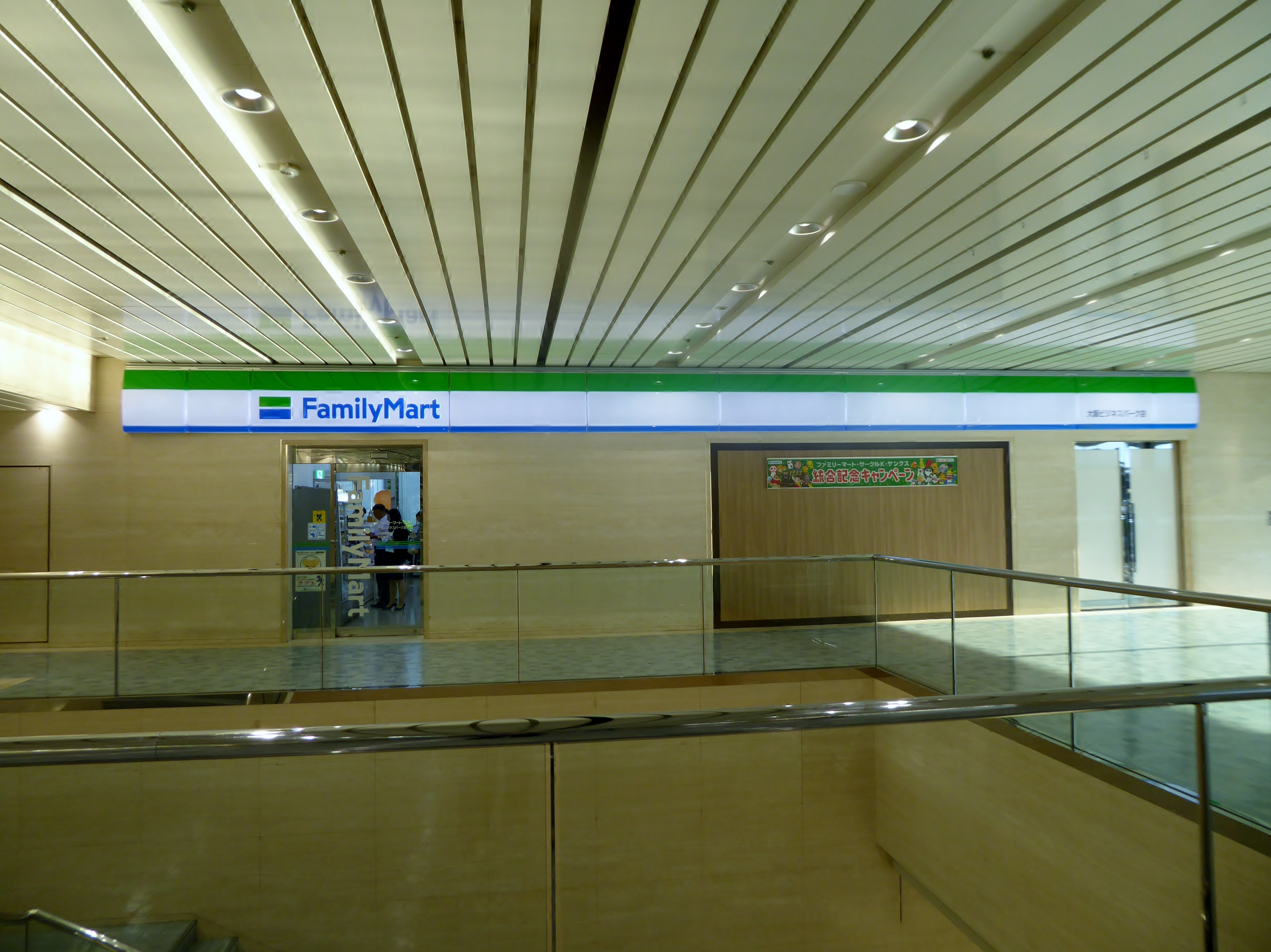 ファミリーマート大阪ビジネスパーク店を撮影。全国における旧サンクスからの転換店舗の1号店となっている。